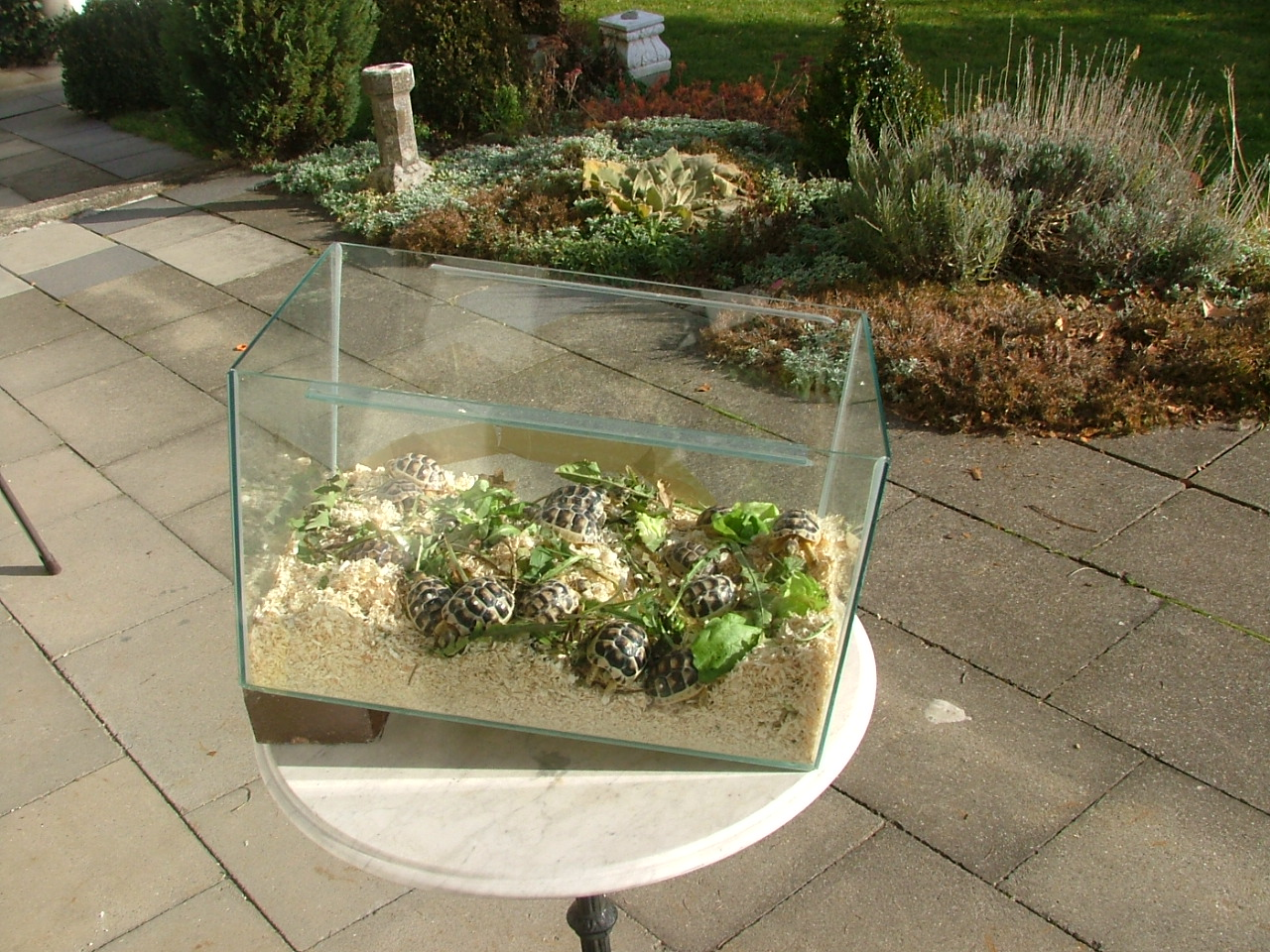 Schildkröten in einem Terrarium